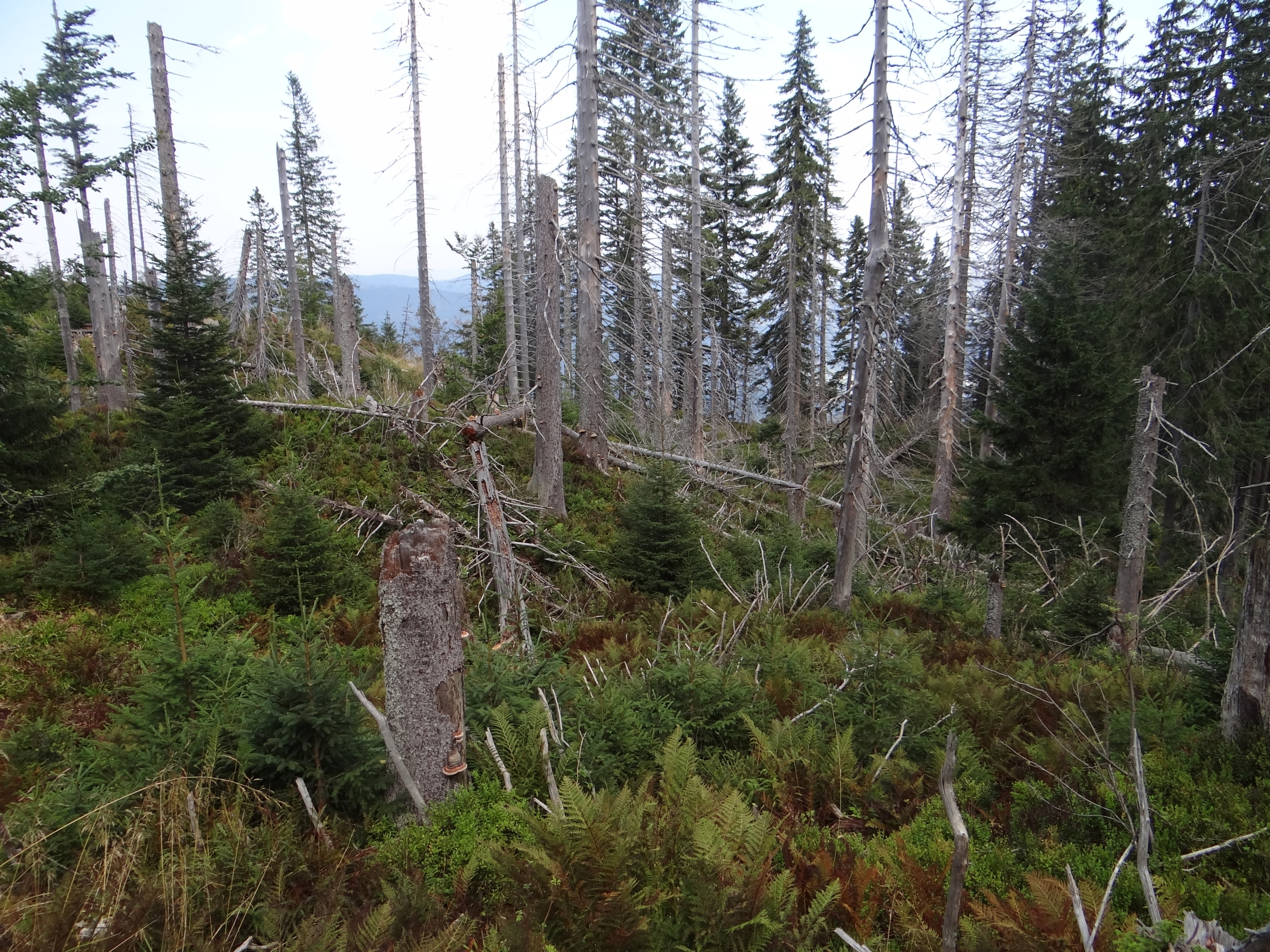 Uschnięty las na Klinie pod Małą Babią Górą